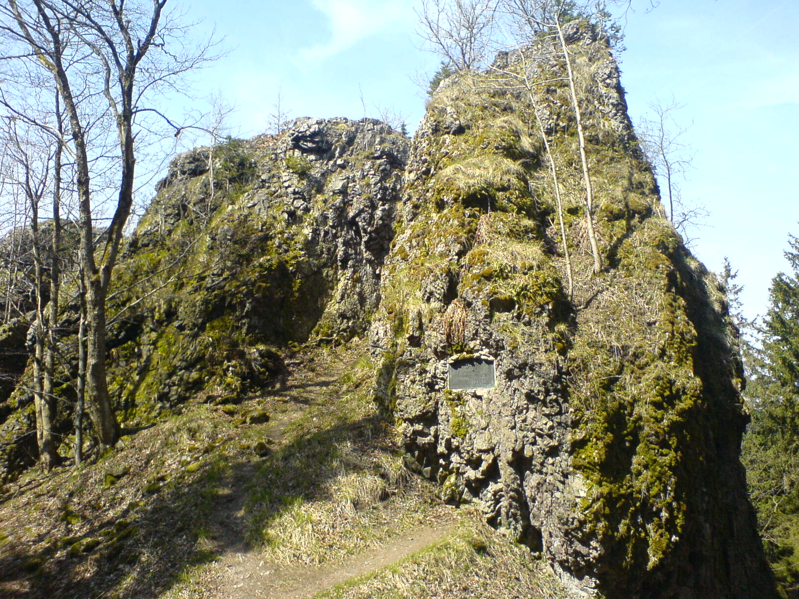 Der Große Hermannstein am Goethewanderweg bei Ilmenau (Deutschland).